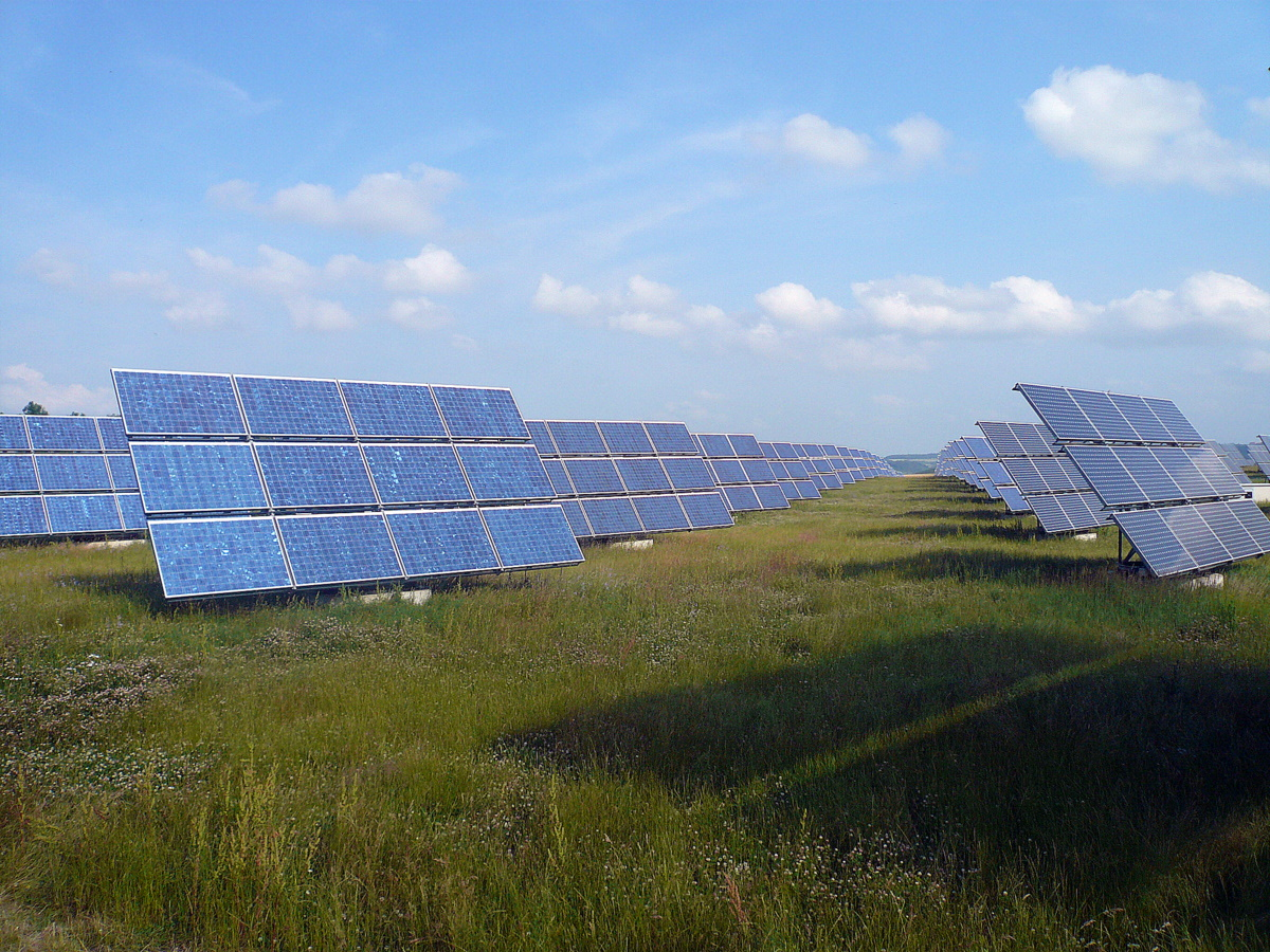 Solarfeld Erlasee bei Arnstein